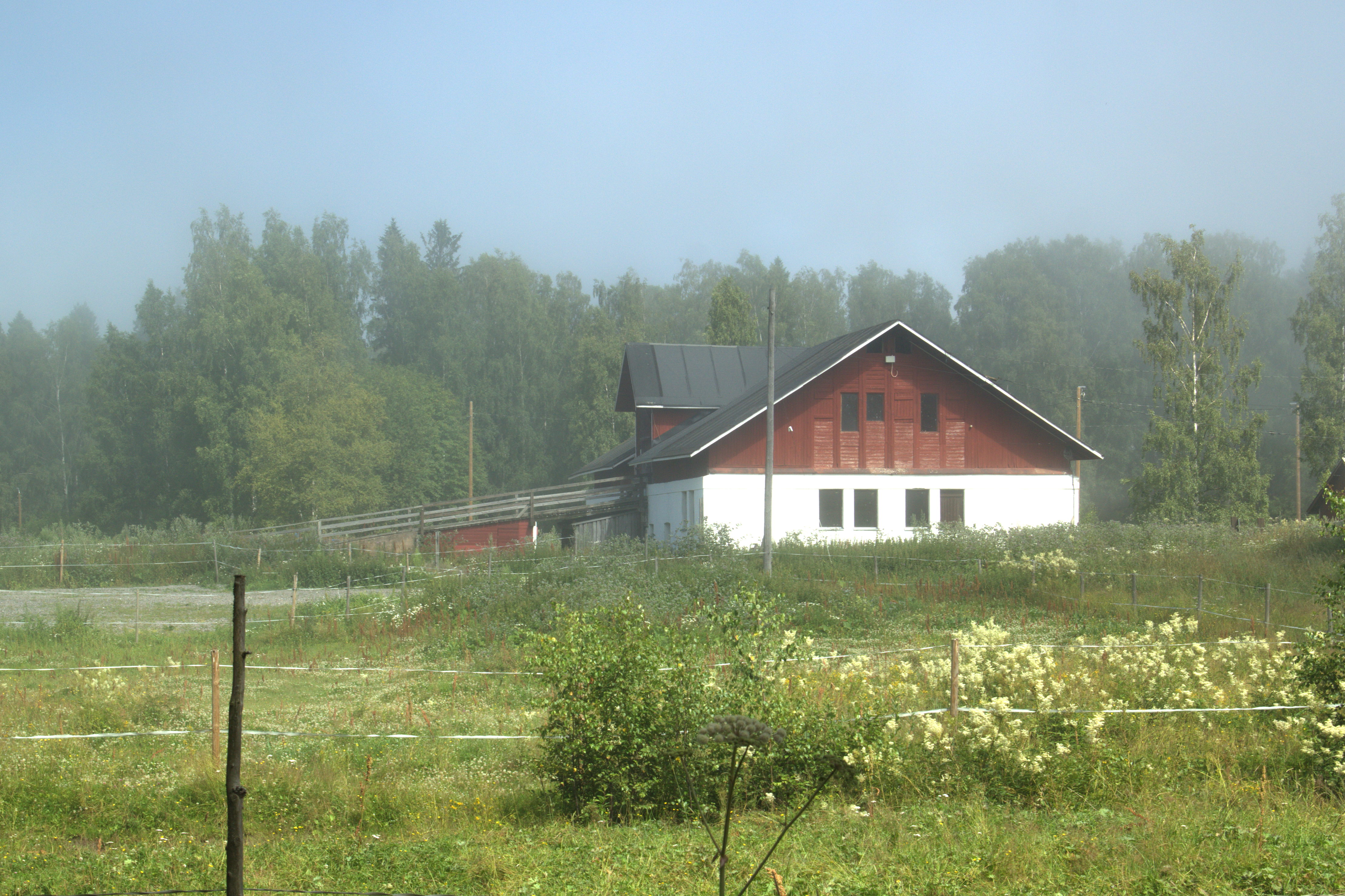 Skatan talli Uutelantieltä nähtynä